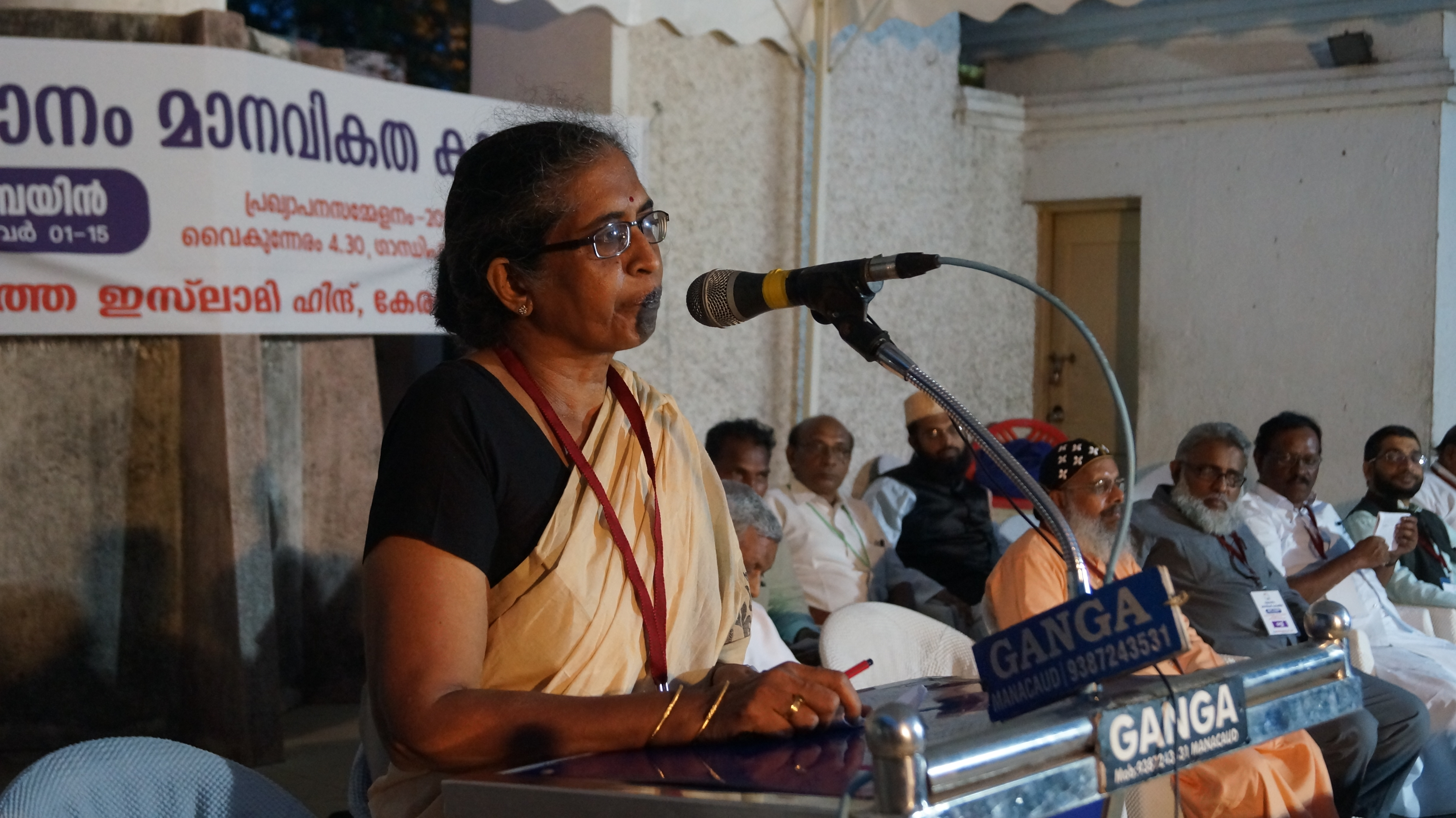 ഒ.വി. ഉഷ ജമാഅത്തെ ഇസ്ലാമി കേരള സമാധാനം-മാനവികത കാമ്പയിൻ ഉദ്ഘാടന വേദിയിൽ